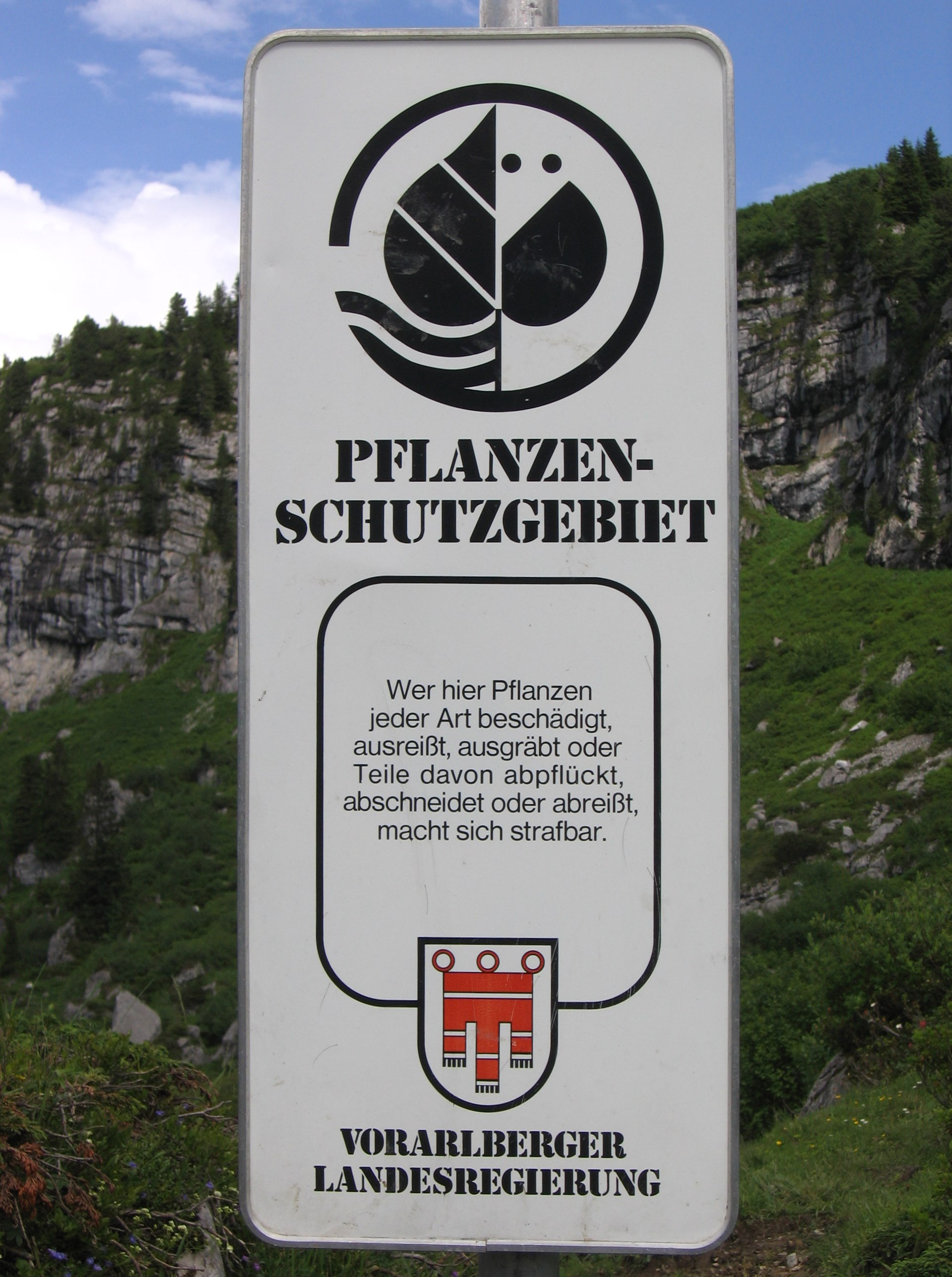 Österreich - Vorarlberg: Hinweisschild "Pflanzenschutzgebiet" im Bereich der Mohnenfluh